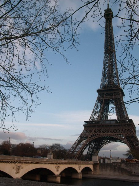 Torre Eiffel - París Francia